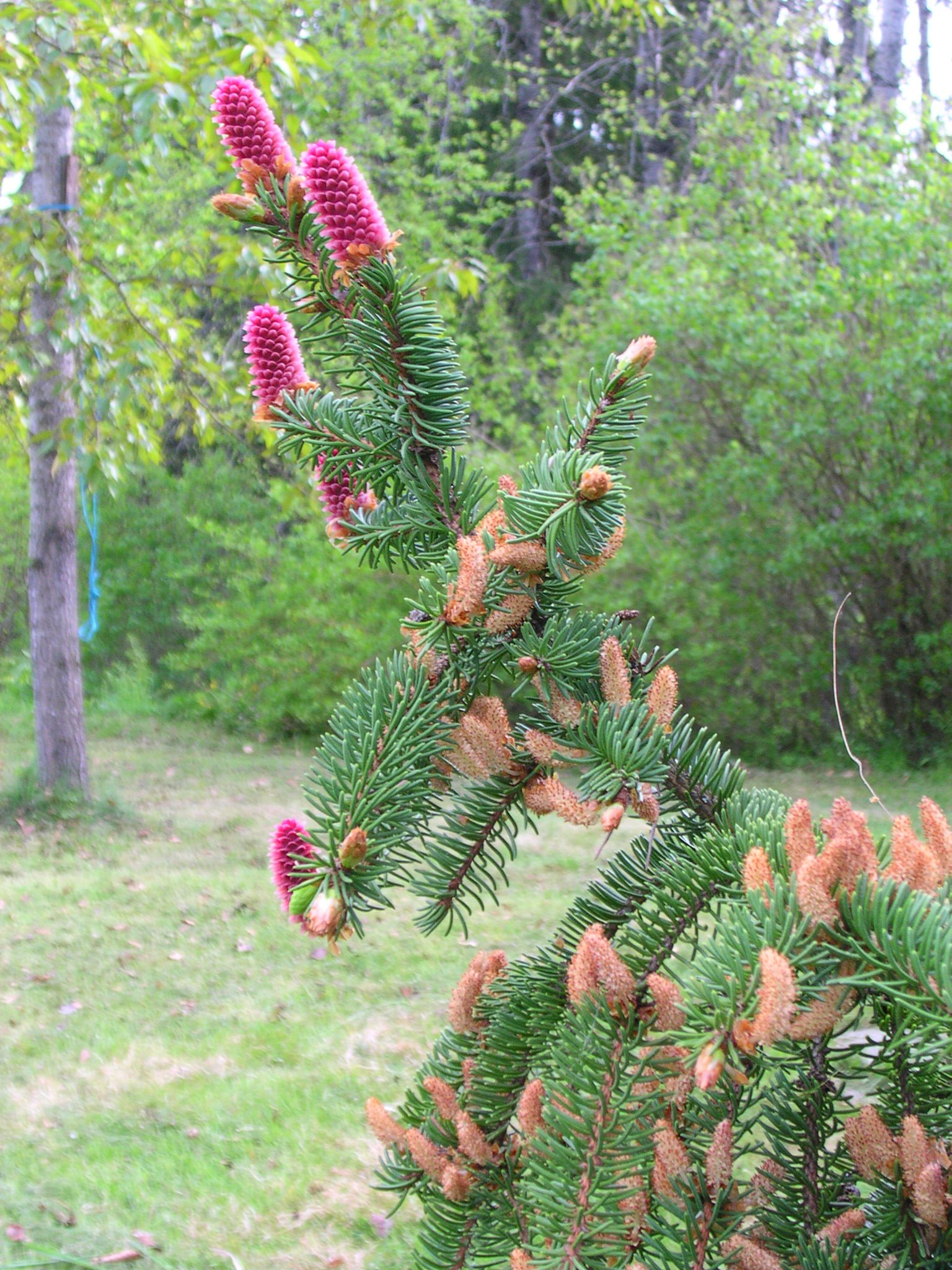 Picea abies